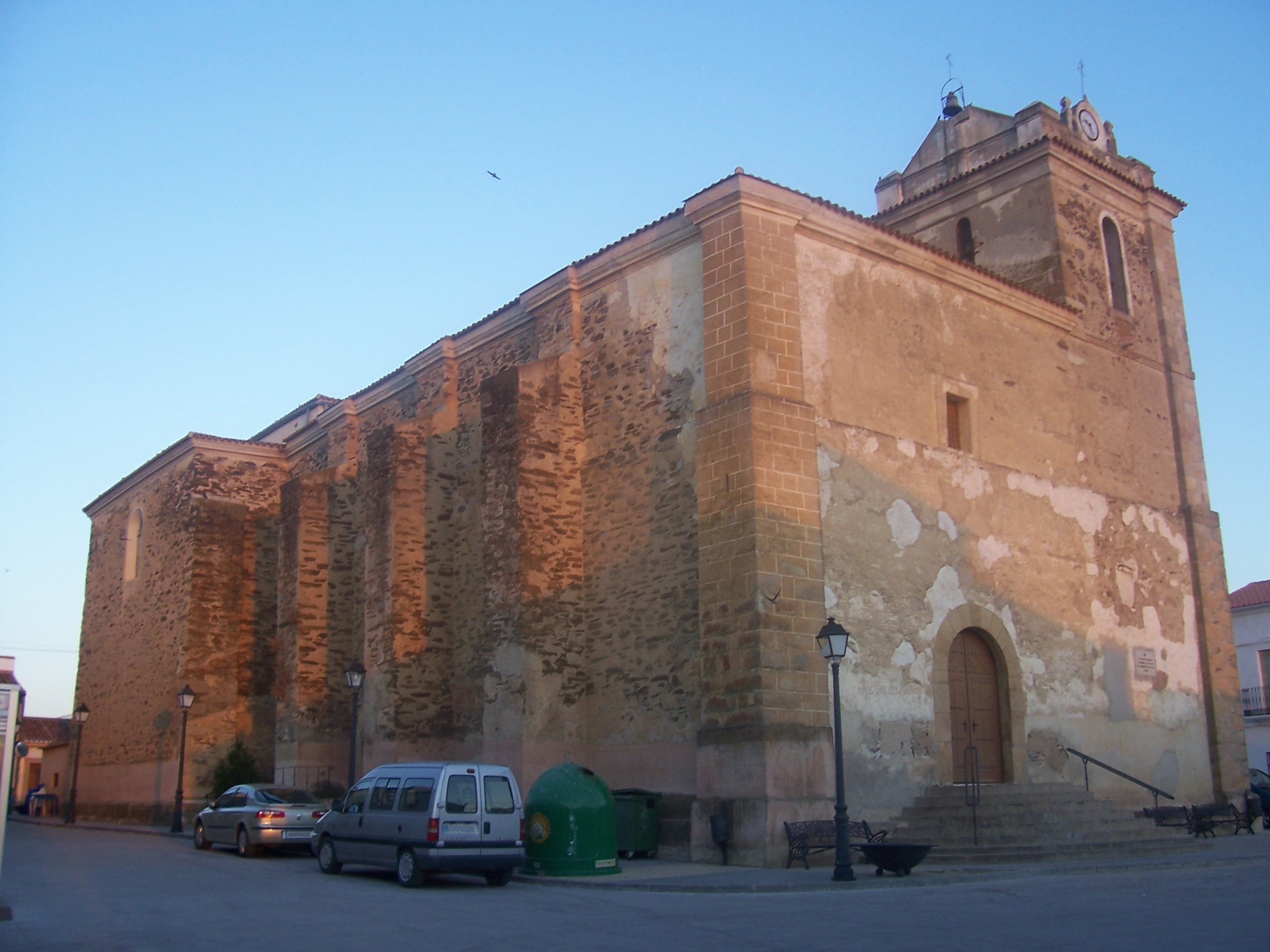 Iglesia de San Ildefonso, Salorino, provincia de Cáceres, España.